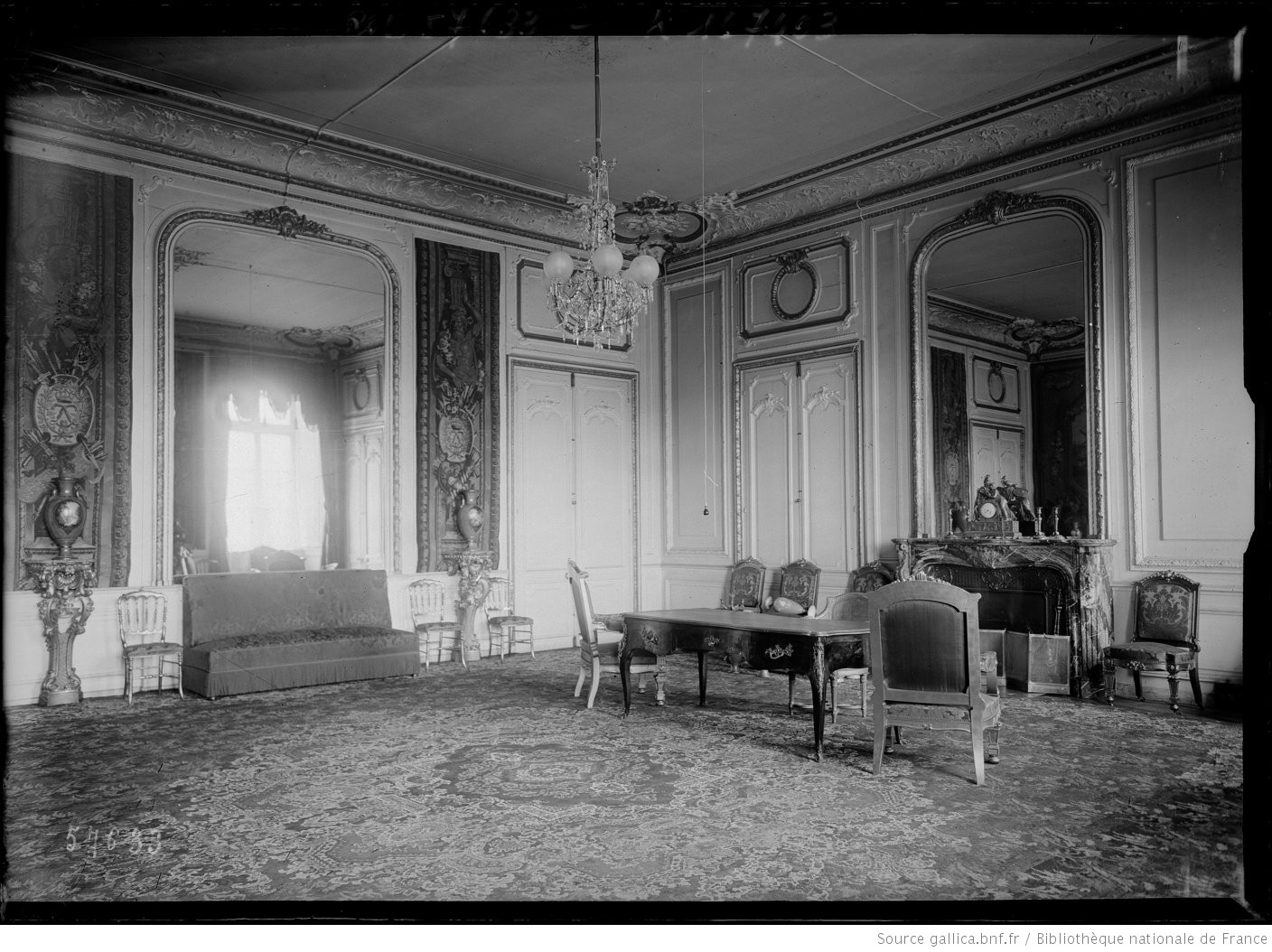 Château de Versailles, bureau du président du Congrès photo prise en 1920 Bibliothèque nationale de France, département Estampes et photographie, EI-13 (689)